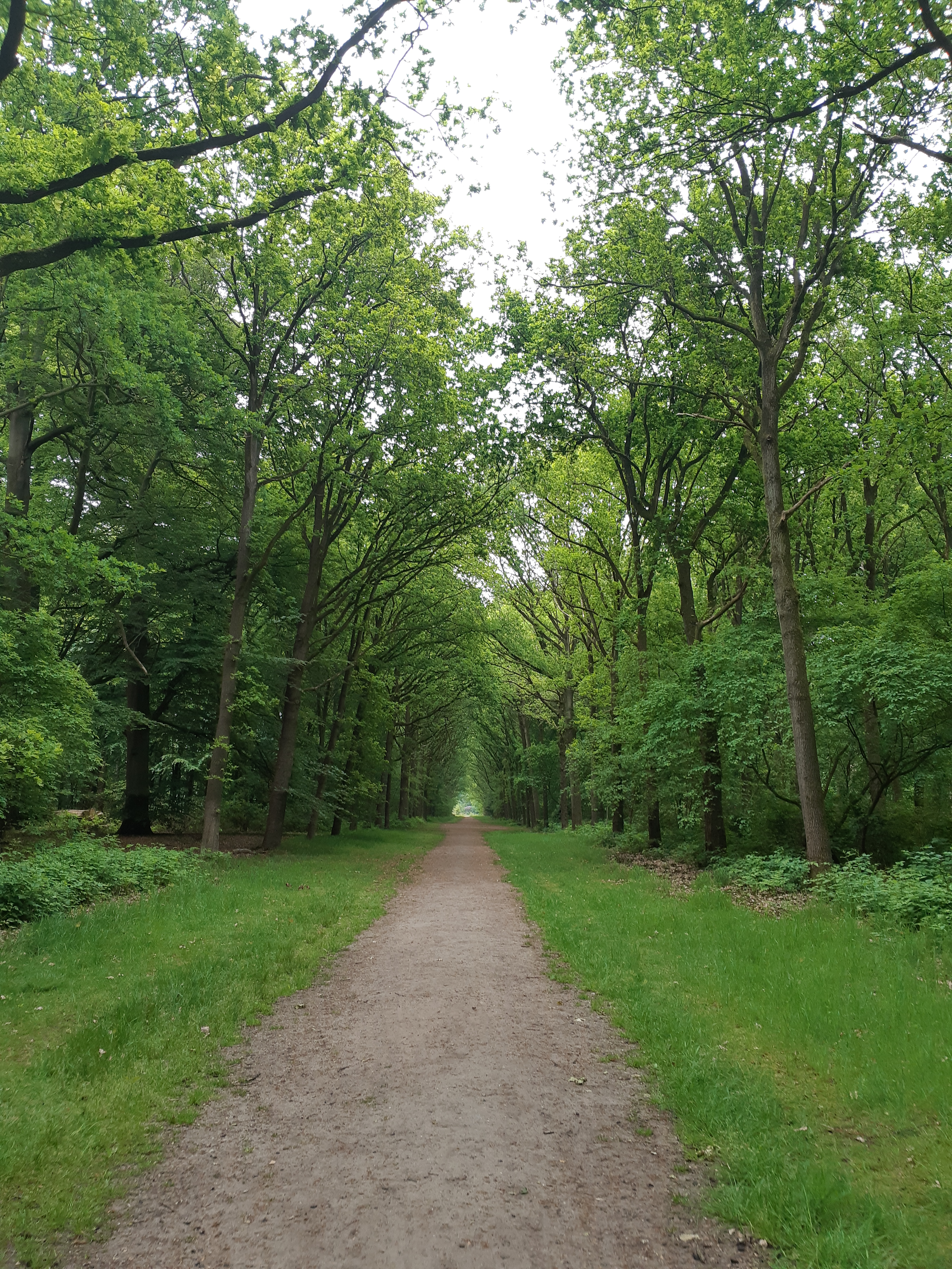 Eikenlaan in Schaep en Burgh